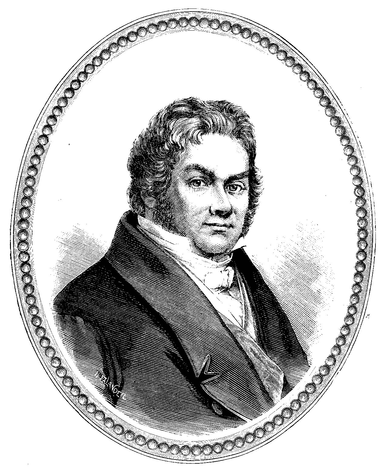 Jöns Jacob Berzelius, kemist. Bild ur planschverket Femtio porträtt af ryktbara svenskar (sent 1800-tal)